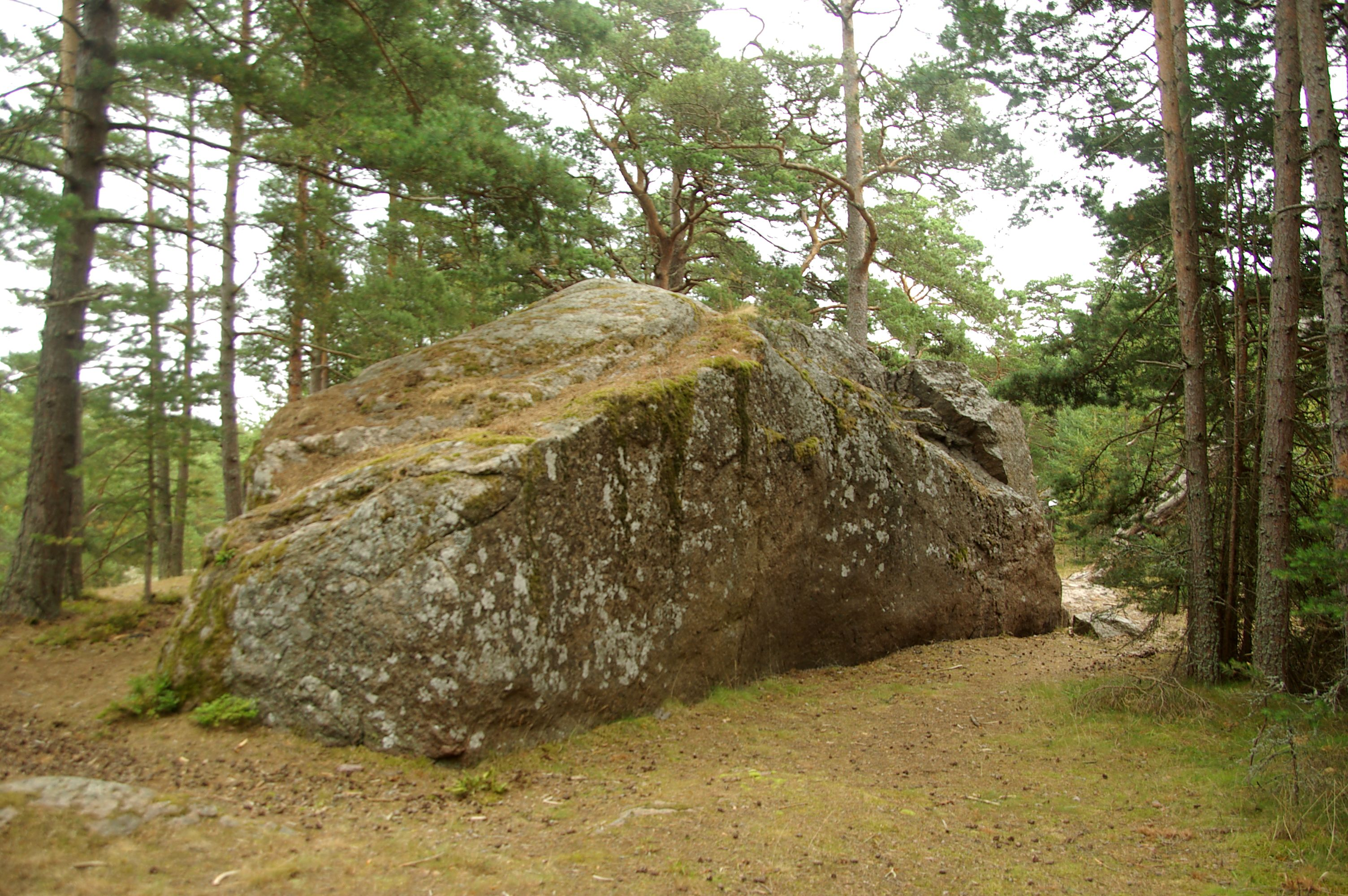 Tulekivi e. Sihi suurkivi